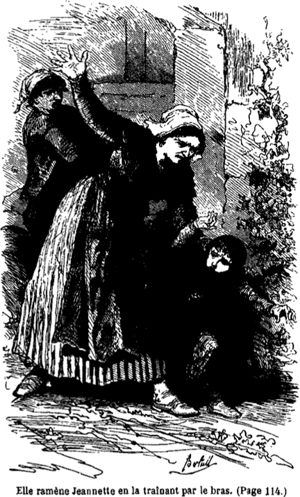 Illustration of Sophie de Ségur's Petites filles modèles